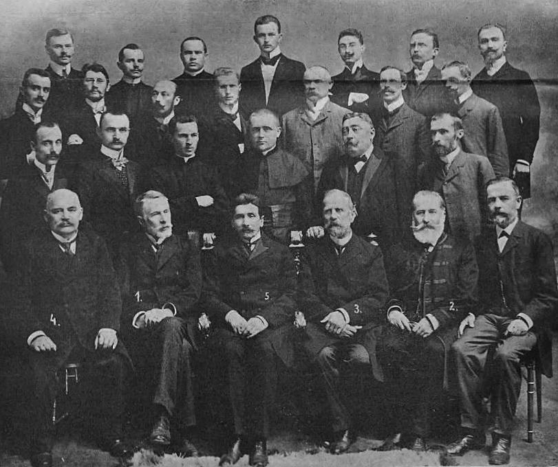 Grono nauczycielskie Gimnazjum Franciszka Józefa we Lwowie (1906). 1: Ludwik Kubala, 2: Józef Czernecki, 3: Wiktor Kłak, 4: Konstanty Łuczakowski, 5: Franciszek Tomaszewski.